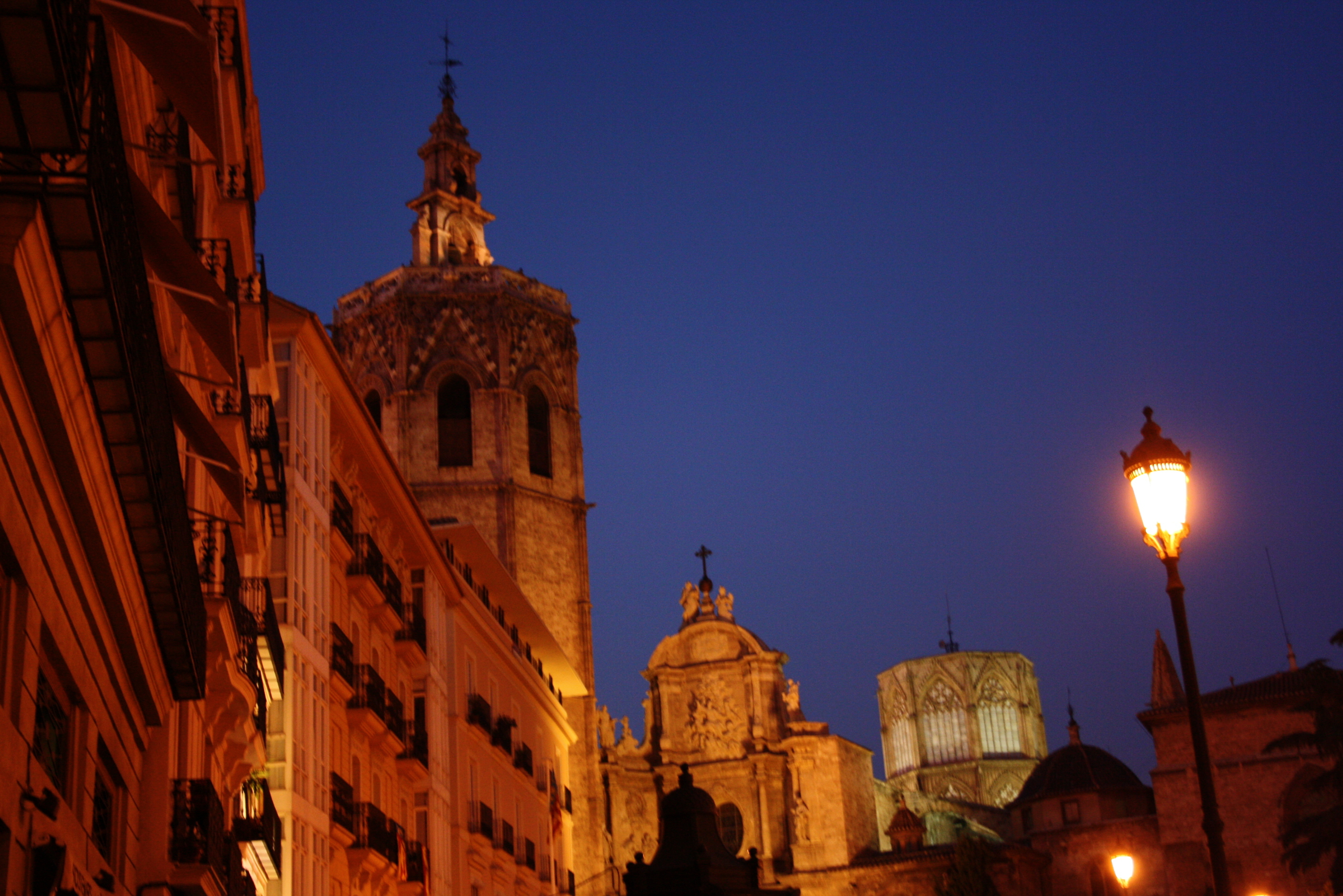 Vista del Micalet de València juntament amb el Cimbori